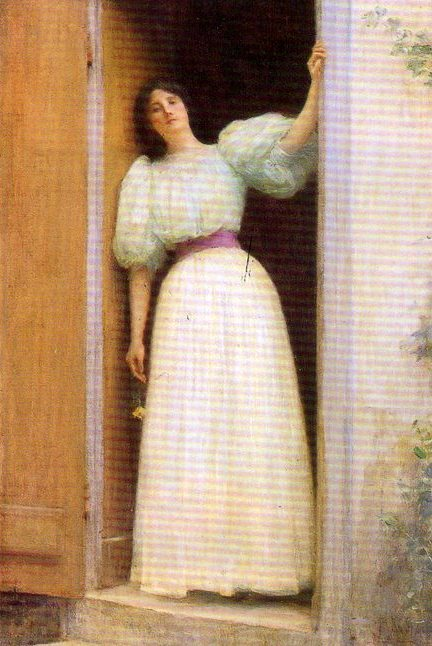 Portrait par Jules Aviat